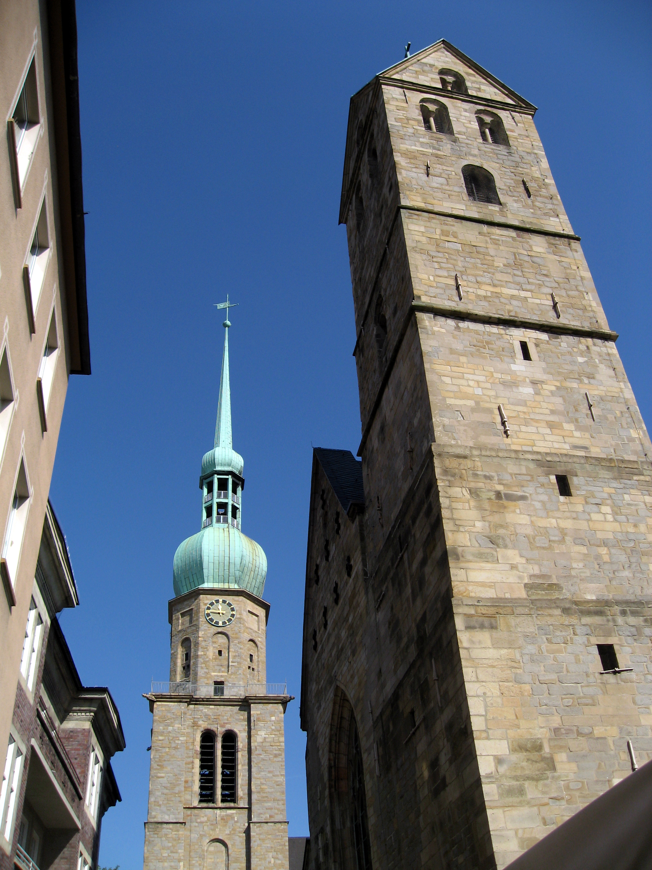 Dortmund - Türme der Marienkirche (rechts) und der Reinoldikirche